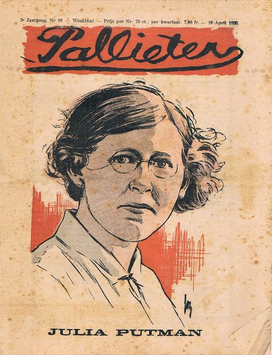 Julia Putman. Front page of the Flemish magazine Pallieter (1922-1928). All front pages were designed and illustrated by Jos De Swerts (1890-1939). Julia Putman, kloosternaam: zuster Maria Hadewych (Waregem 19 oktober 1901 – Dindigal 22 november 1959). Dochter van de Vlaamsgezinde uitgever en toneelschrijver Palmer Putman, zus van Willem Putman.